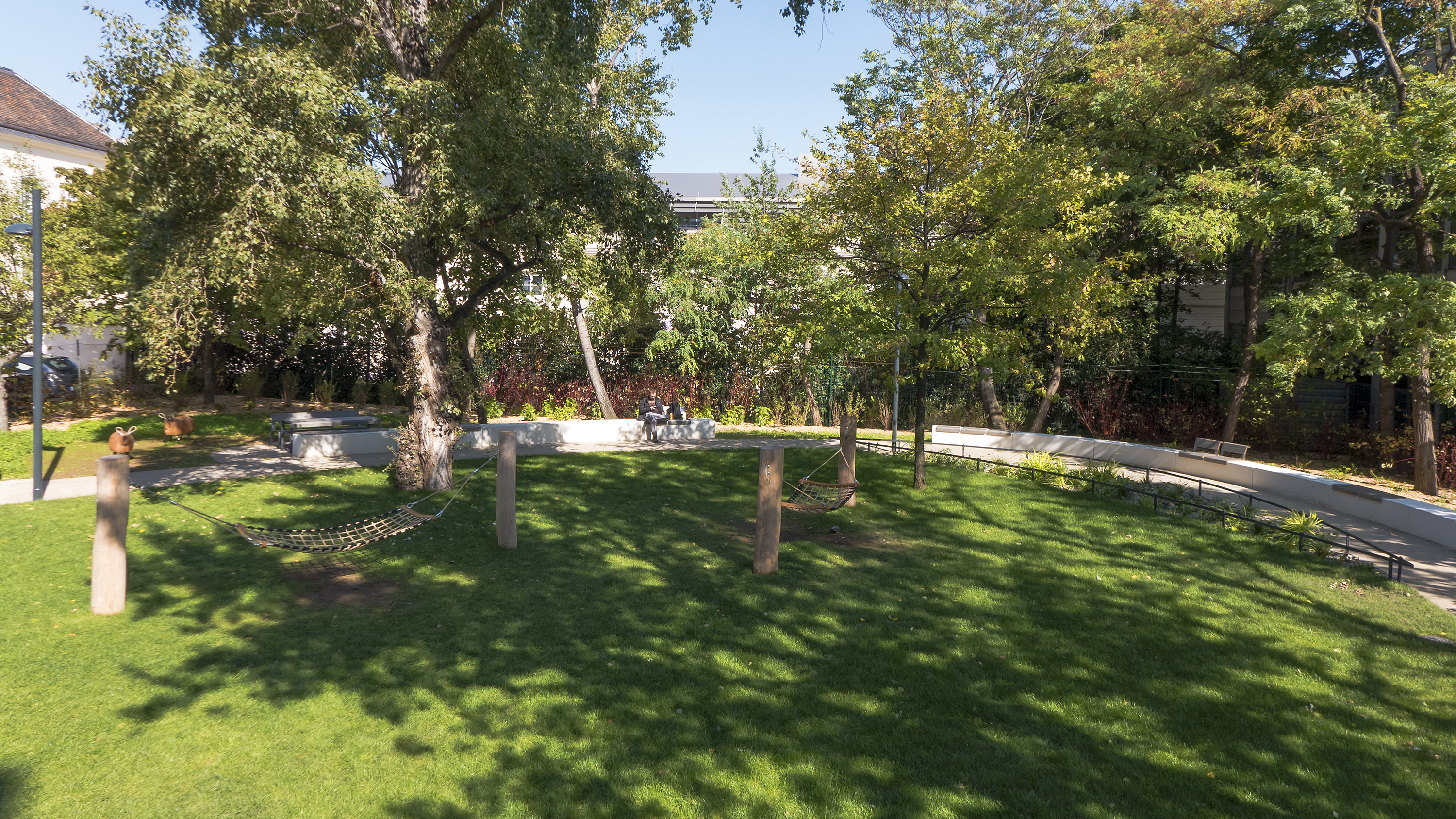 Grete-Jost-Park in Wien 3